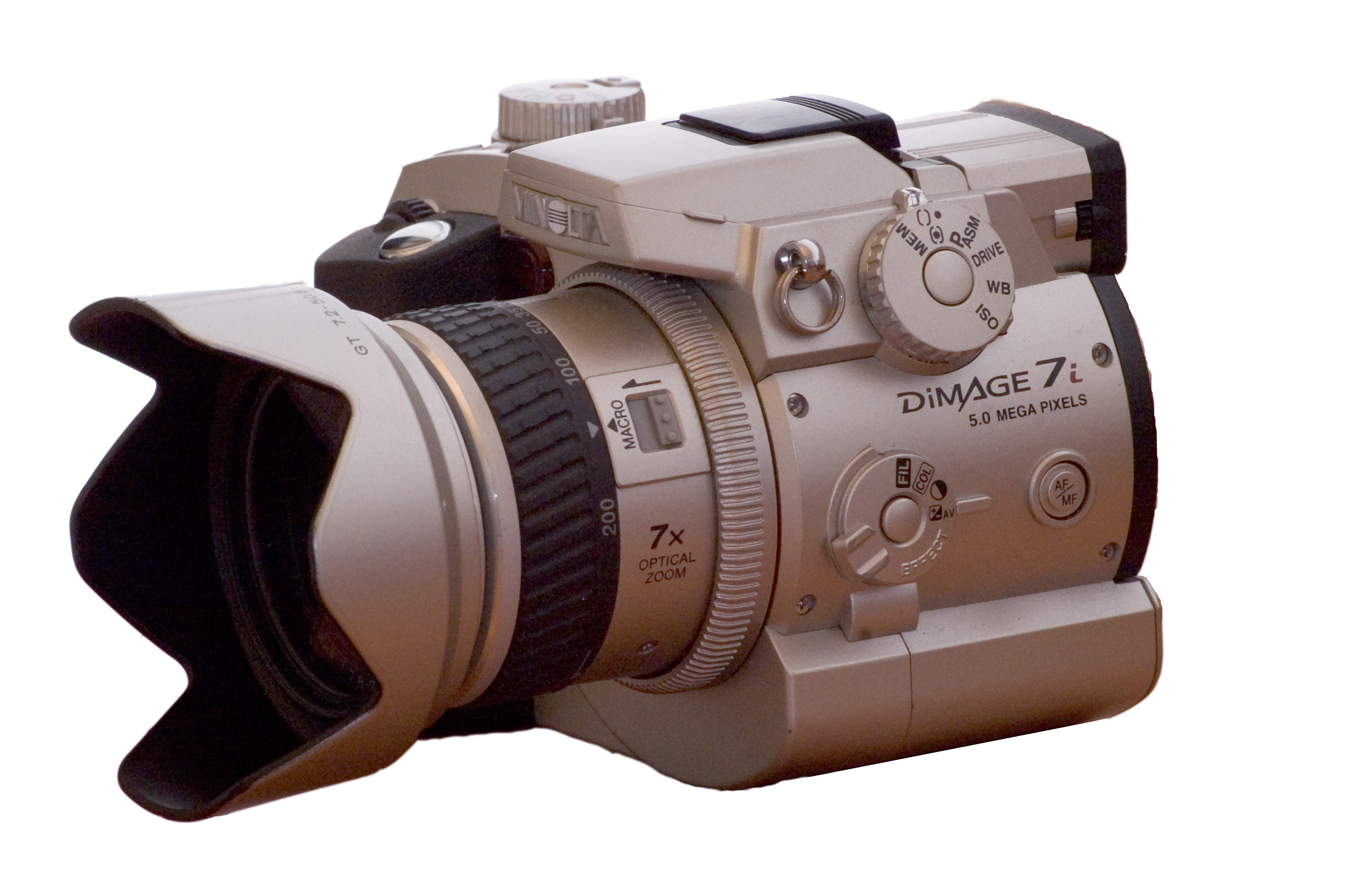 Minolta Dimage 7i, left side Author: Fanny Schertzer